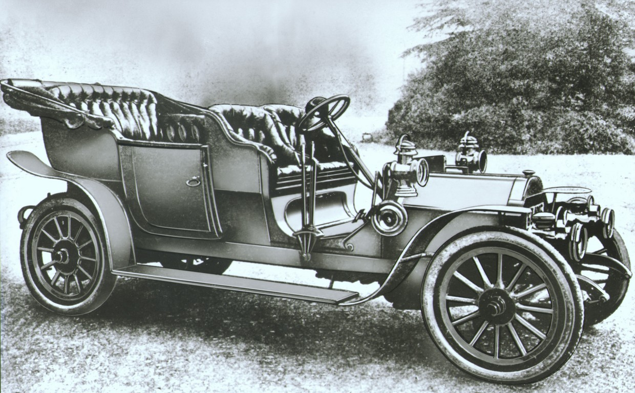 Disegno della vettura Lancia Alfa 12 HP Double Paheton, 1907-1909 (Fiat Group Marketing & Corporate Communication spa, Archivio e centro storico Fiat, Lancia)